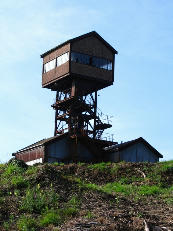 Puits de l'ardoisière Saint-Quentin, commune de Rimogne (Ardennes)